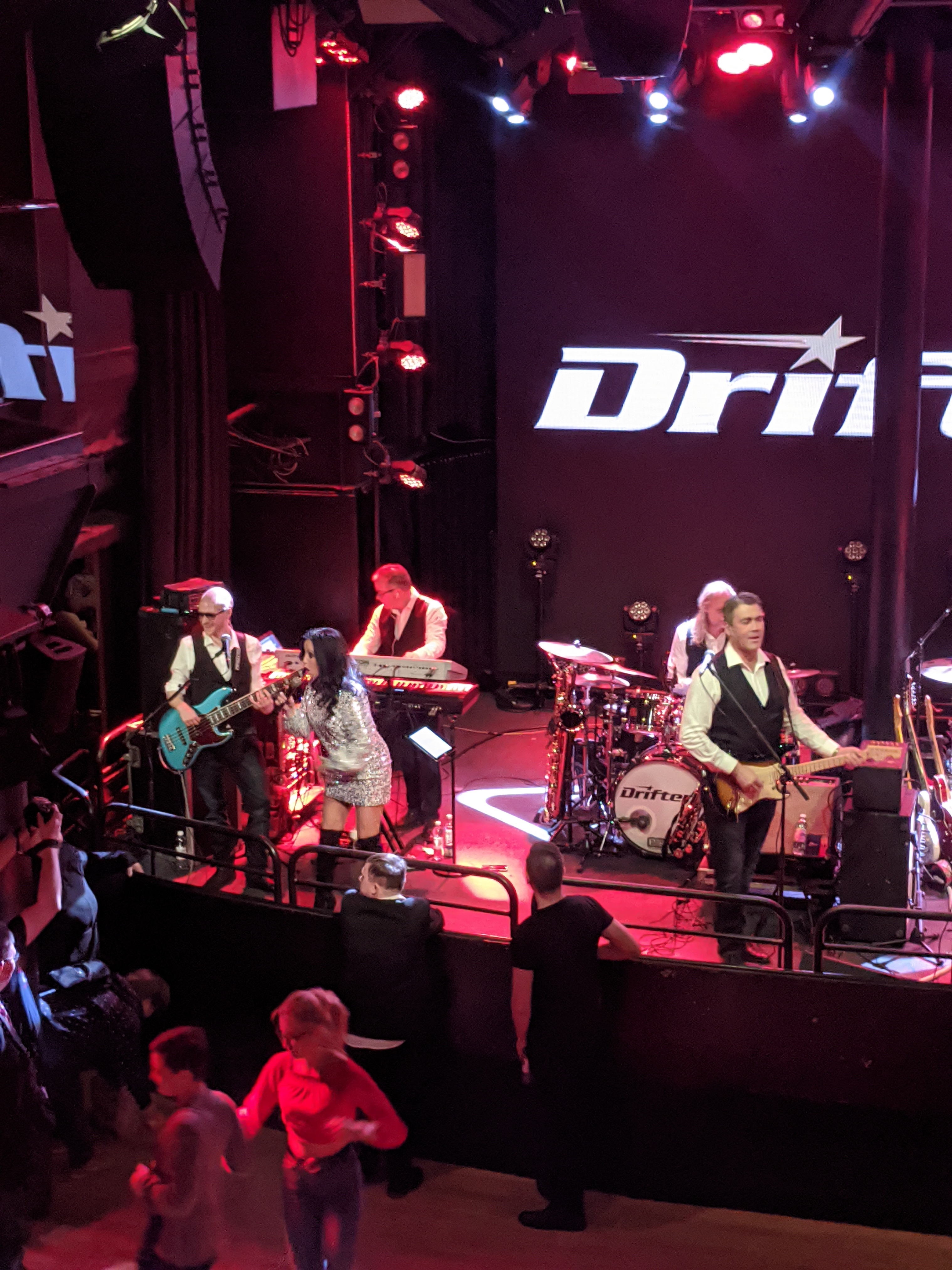 Drifters på Cinderella